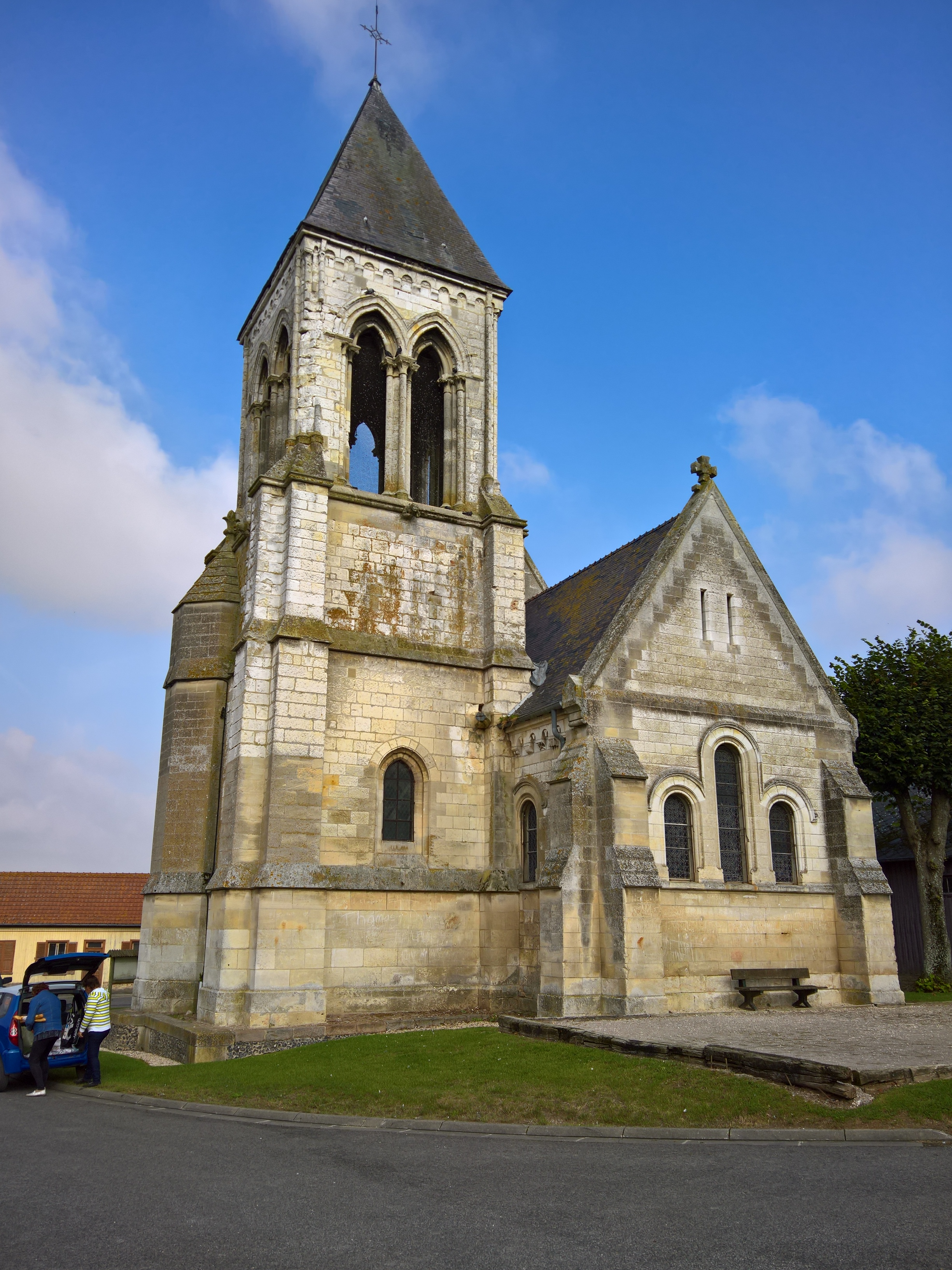 Chevet de l'église romane de Namps-au-Val